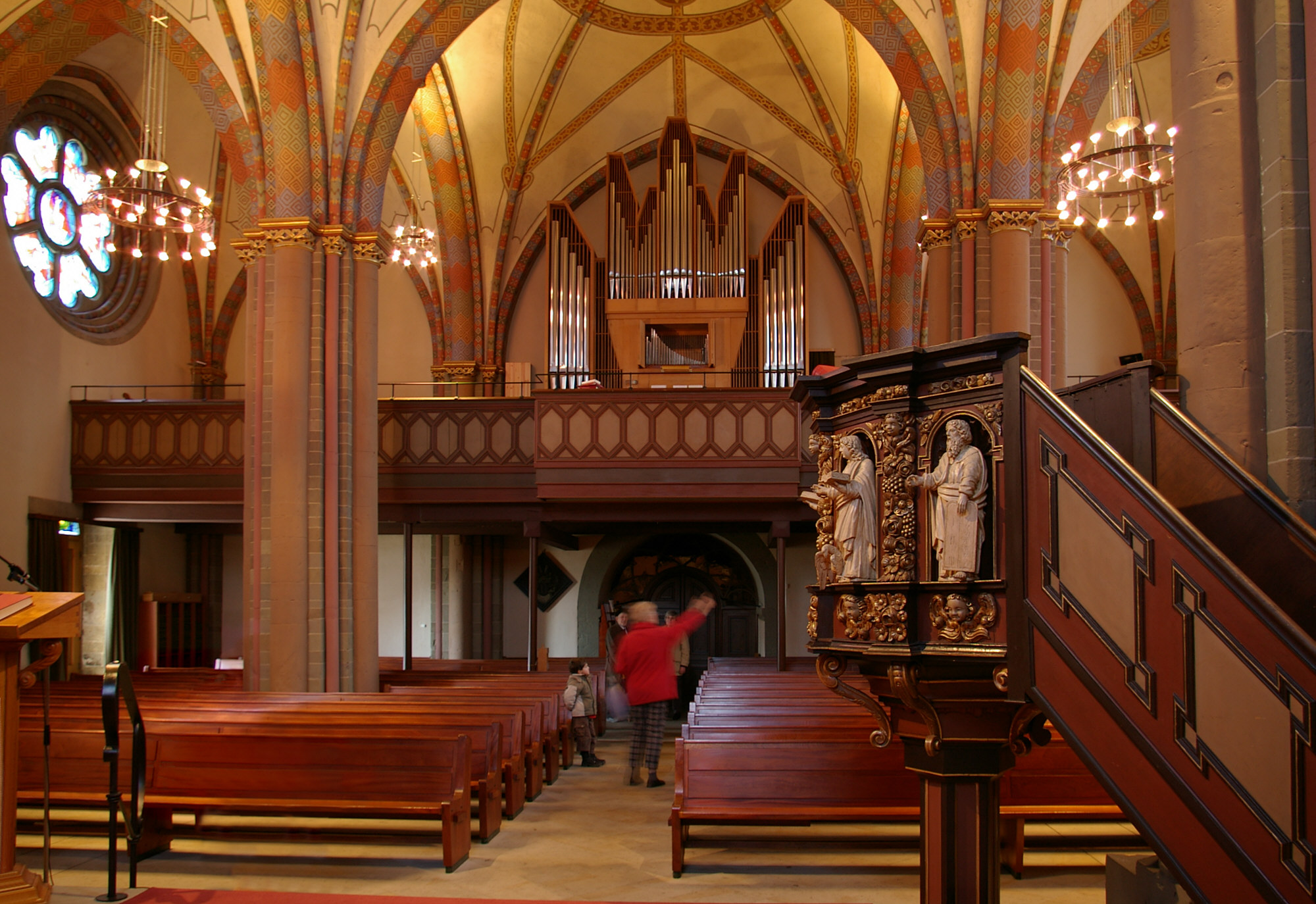 Margaretenkirche Methler, Nordrhein-Westfalen. Blick vom Altar auf die Orgel